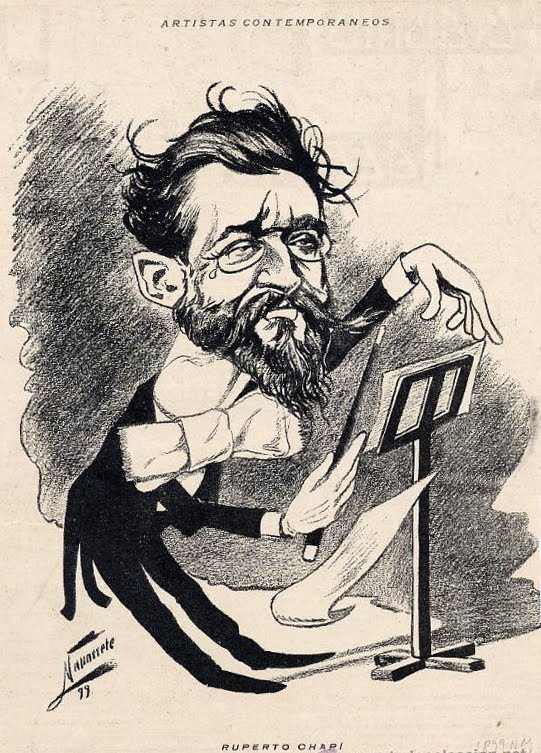 Caricatura de Ruperto Chapí Lorente.